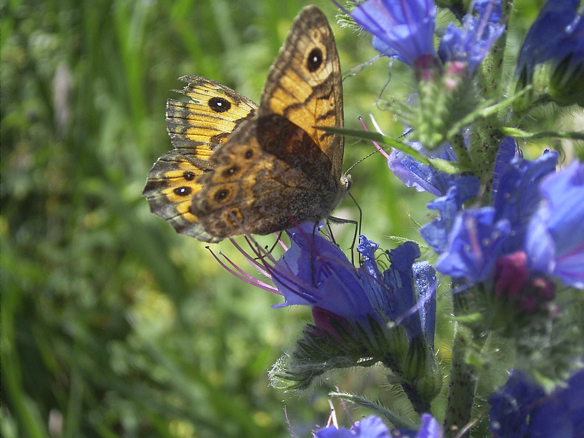 Lasiommata megera on Echium vulgare, Austria